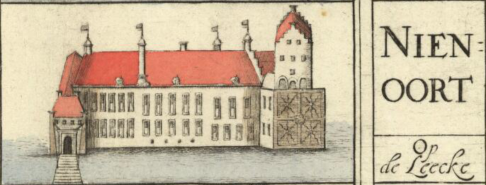 Nienoord